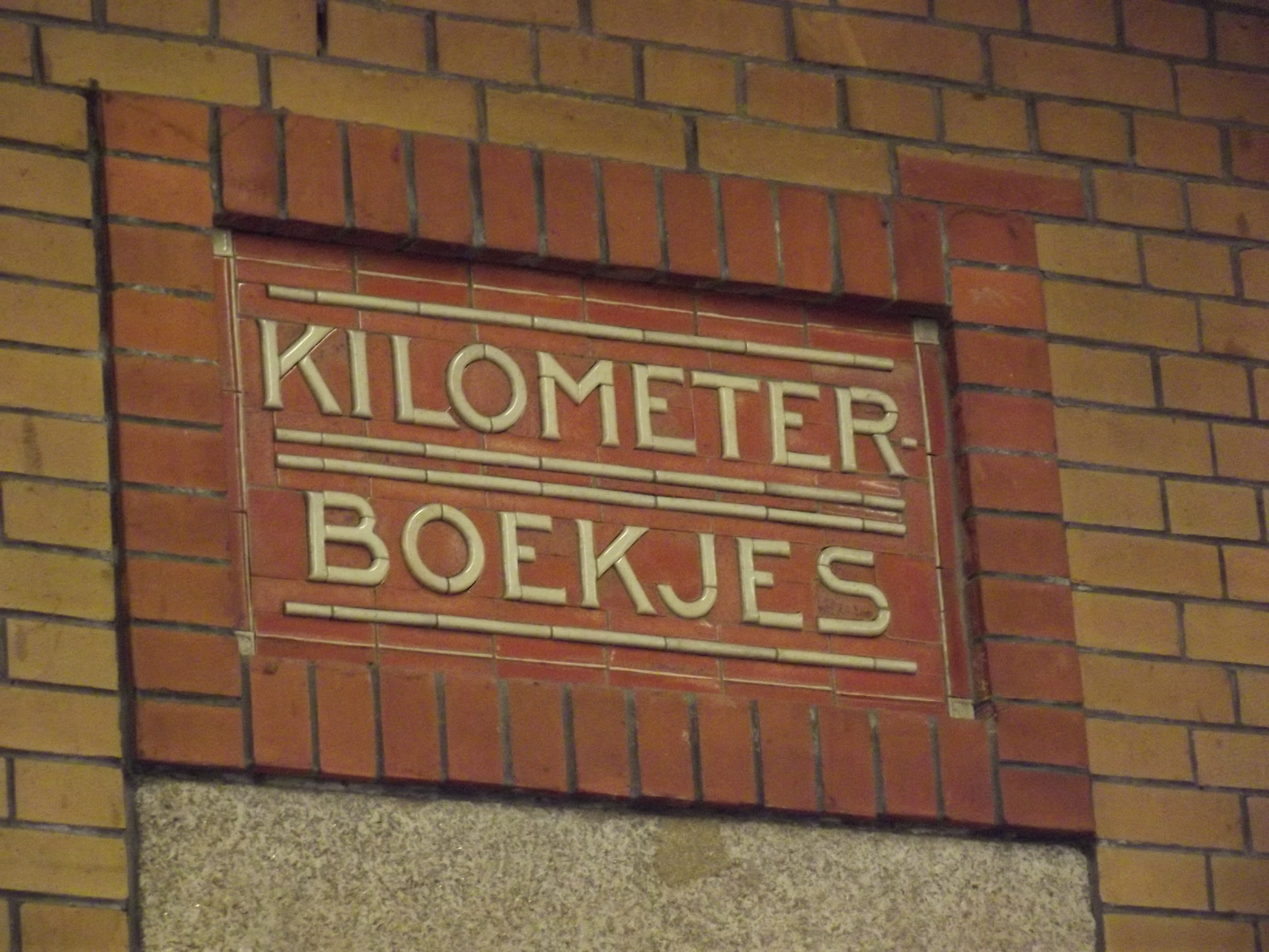 Tegelopschrift voor het vroegere loket "kilometerboekjes"